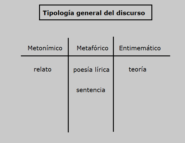 Cuadro que representa una tipología general del discurso propuesta por Roland Barthes en su ensayo "Introducción al análisis estructural de los relatos" de 1966.